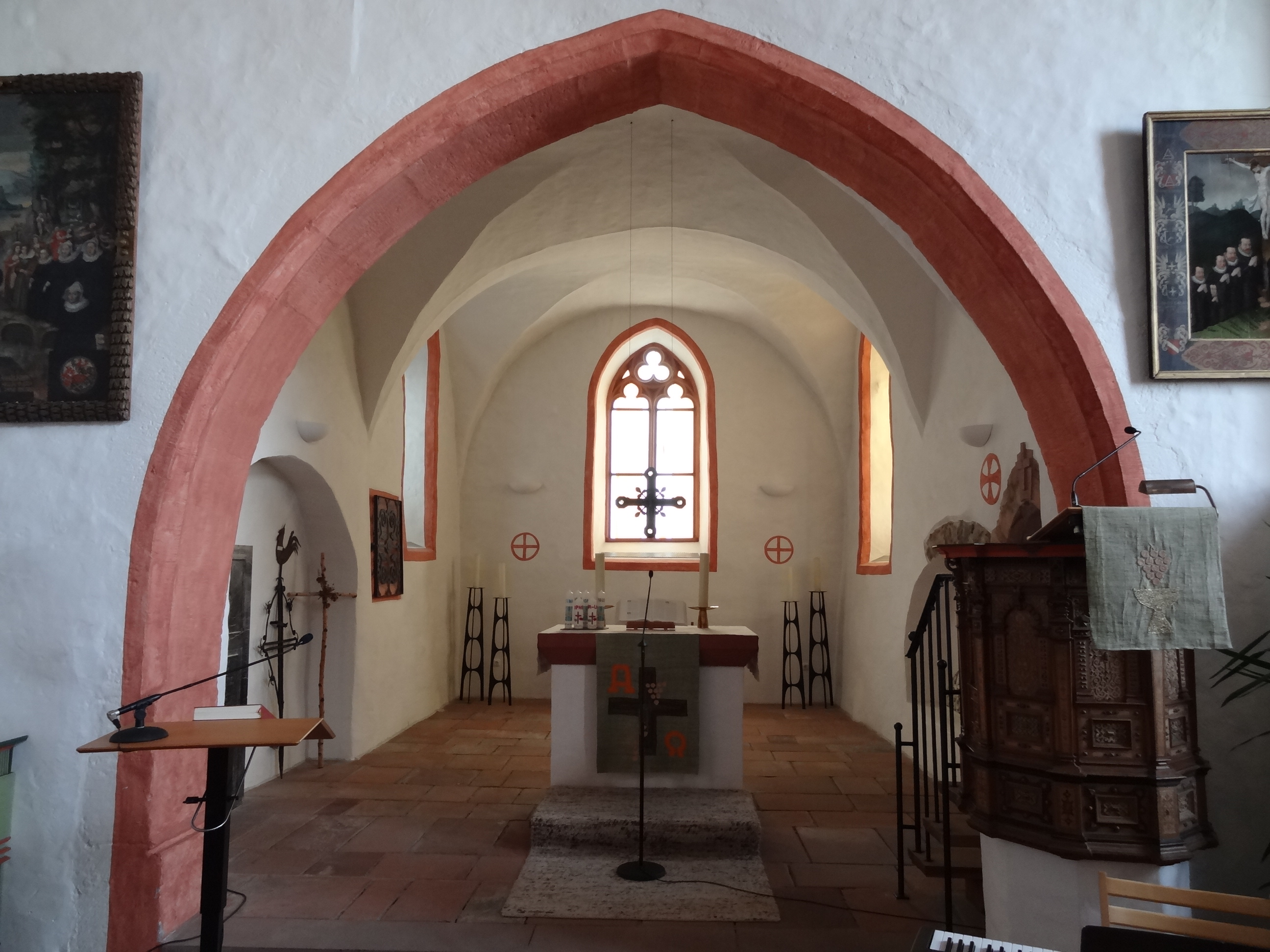 Margarethenkirche (Krofdorf)